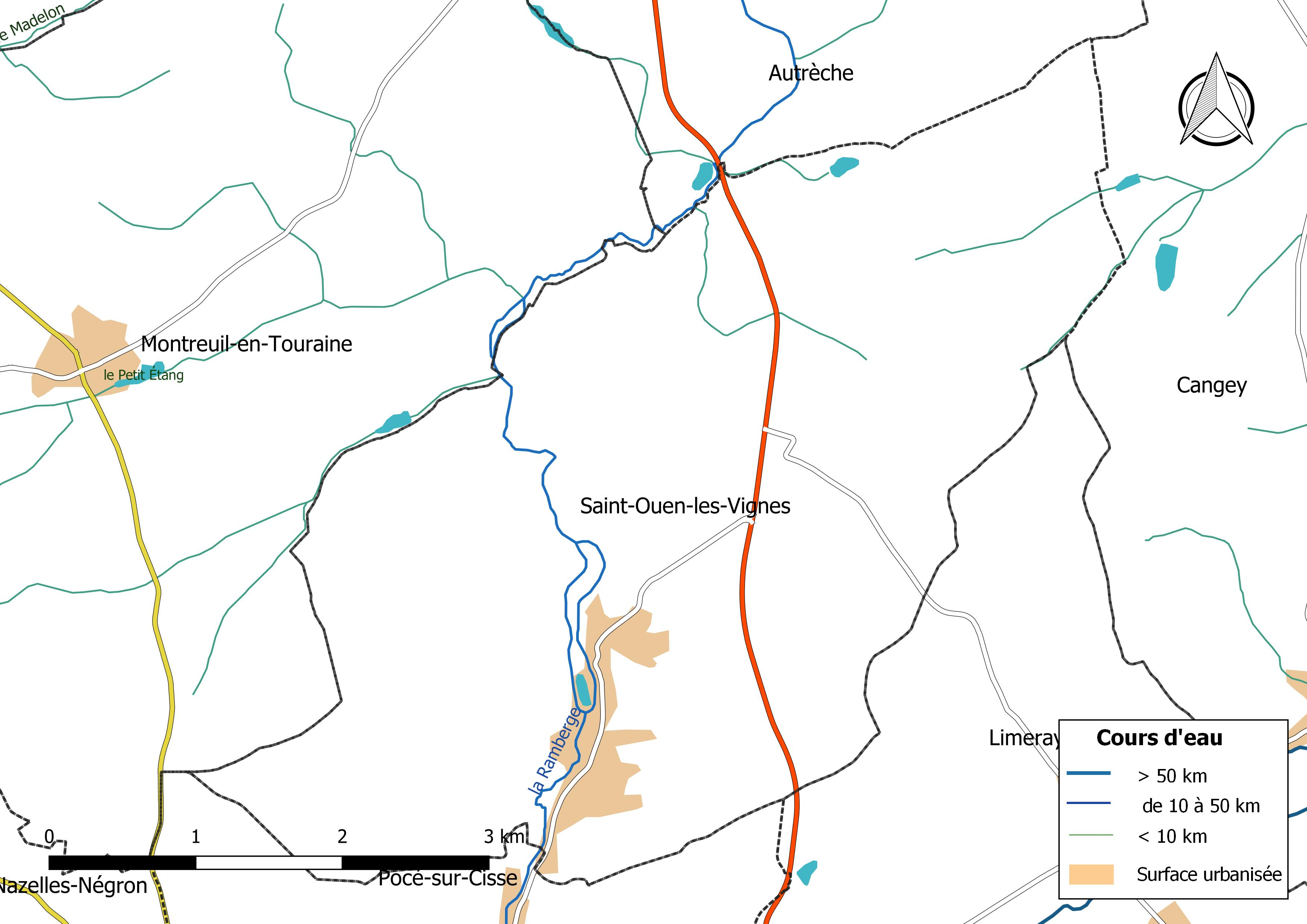 Carte du réseau hydrographique de la commune de Saint-Ouen-les-Vignes (France).